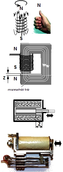 Elektromagneti